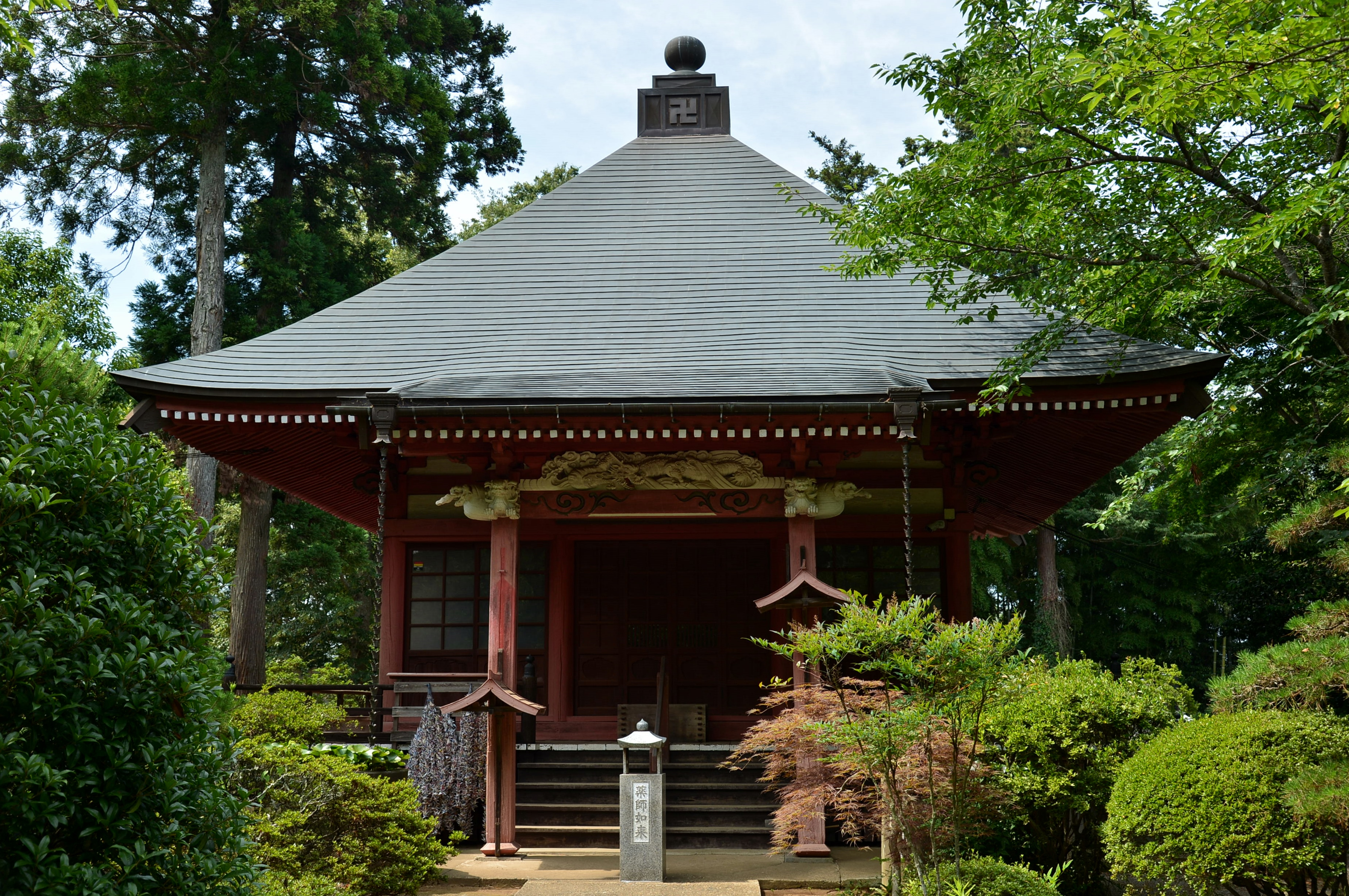 西蓮寺の薬師堂（茨城県行方市）